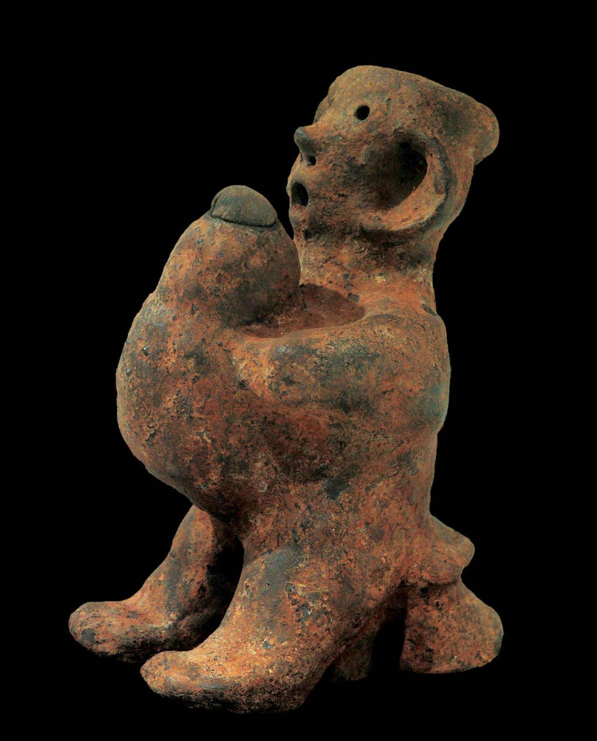 Sala de Renacimiento del Museo de Arte Africano Arellano Alonso